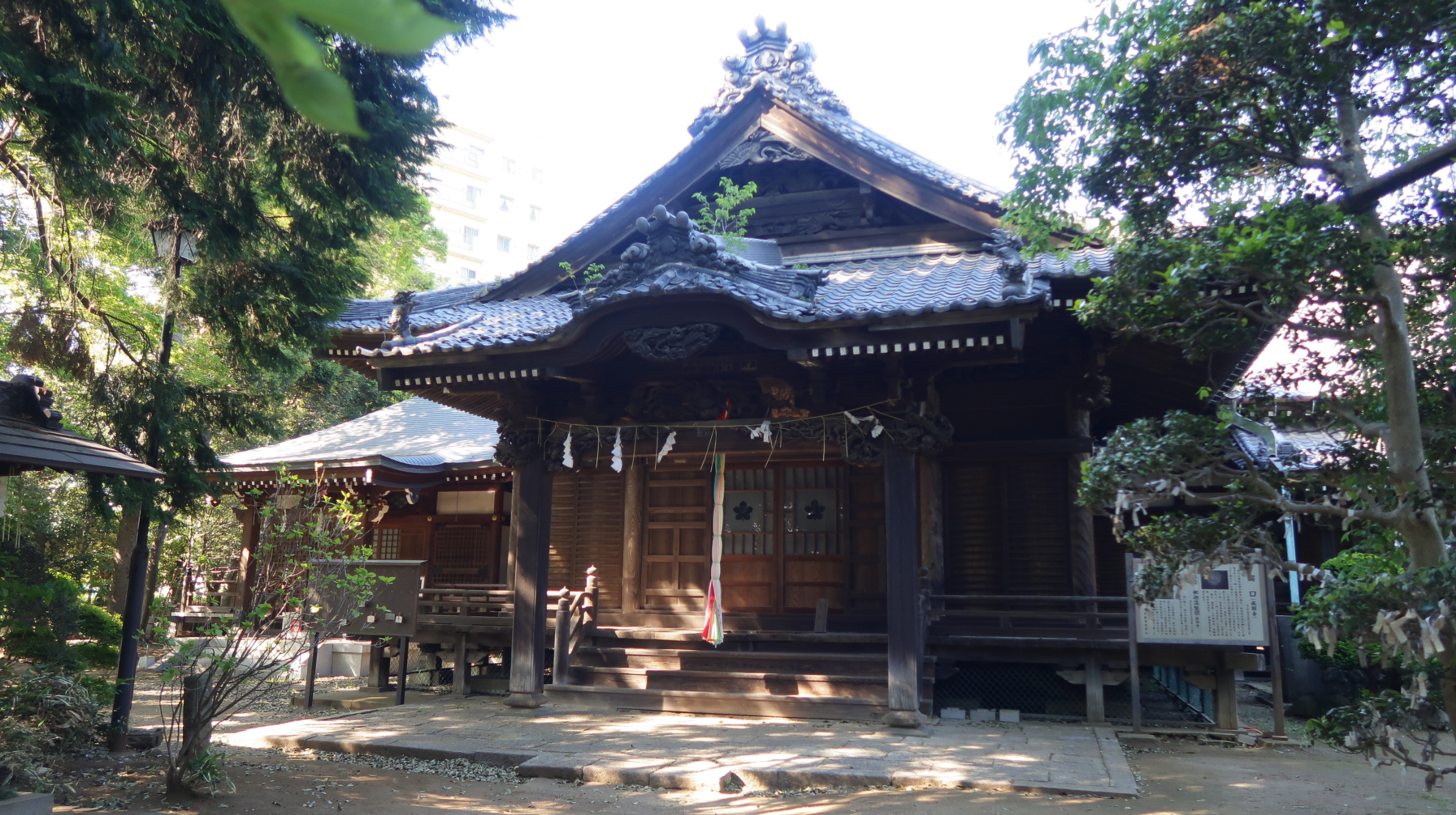 成顕寺（千葉県流山市駒木） Canon PowerShot G7 X Mark II